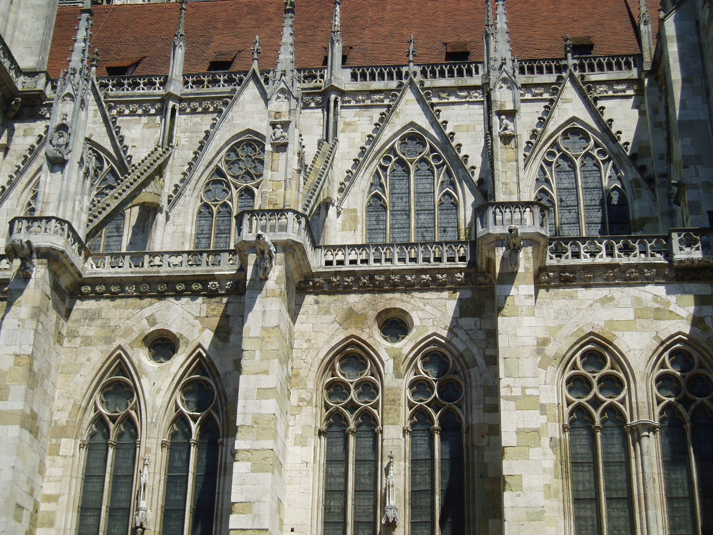 Südfassade des Regensburger Domes. This file is part of a series: Details